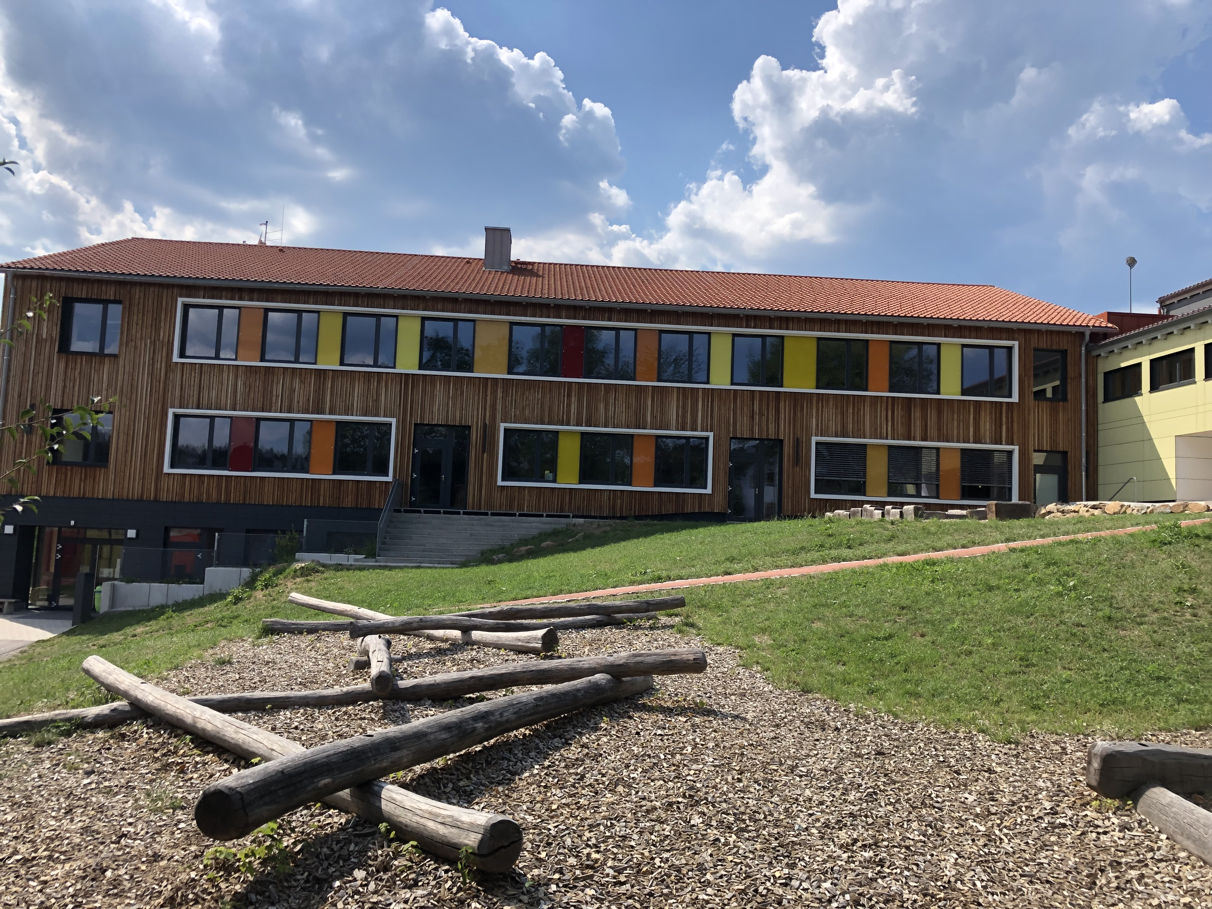 Heinz-Theuerjahr-Grundschule in Neuschönau (Juli 2019)